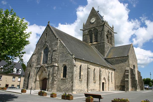 Sainte-Mère-Église Church